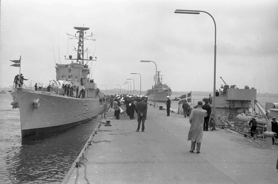 Ankunft des dänischen Flottenverband von 14 Schiffen mit 800 Mann Besatzung zur Kieler Woche 1963. Im Bild links die Fregatte ESBERN SNARE (F 341, dän.). In der Bildmitte das Marinemusikkorps Ostsee. Im Hintergrund rechts der Tender AEGIR (A 560, dän.).